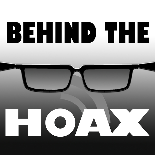 Logo des Podcasts Behind the Hoax